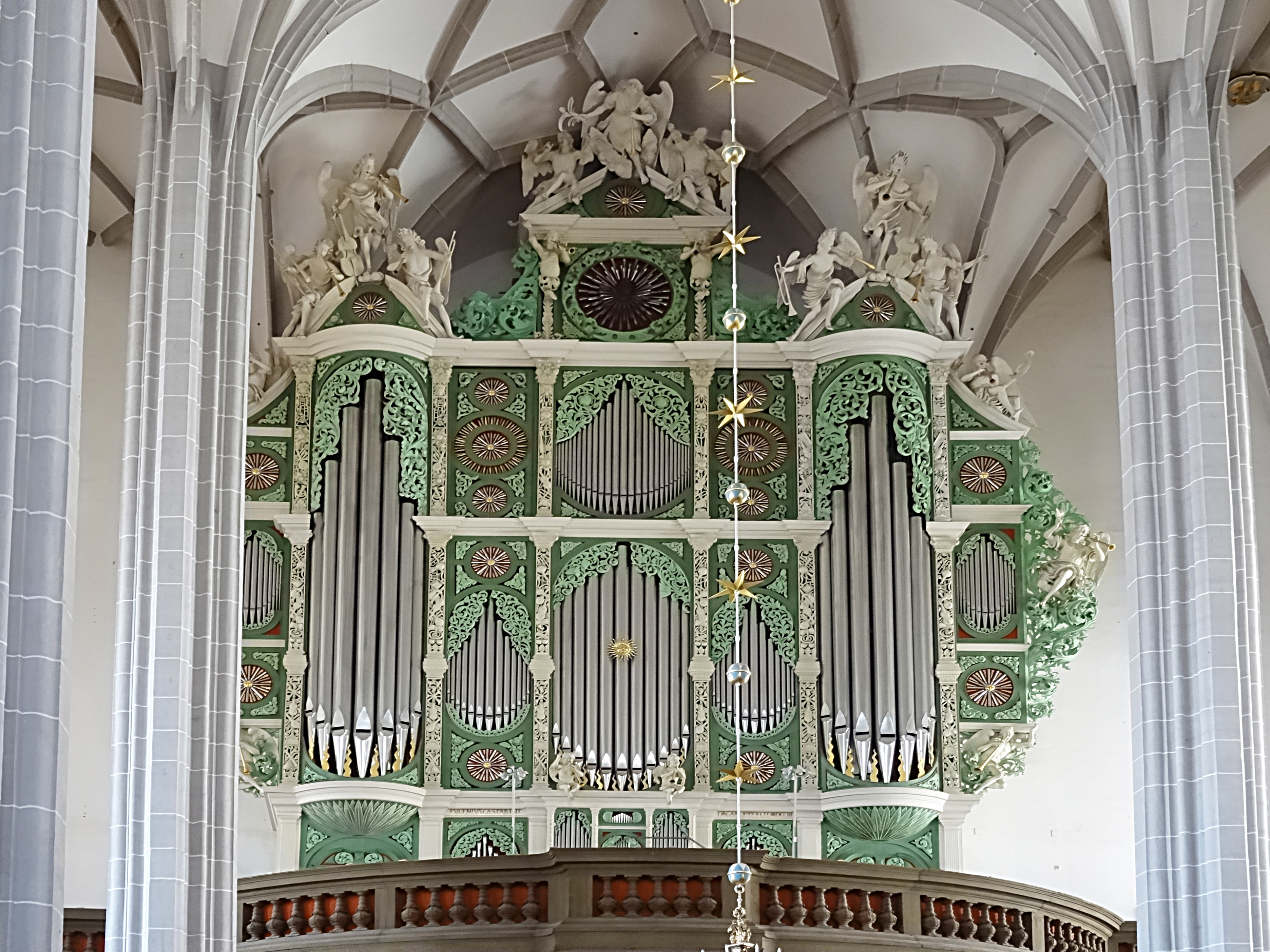 Die Sonnenorgel in St. Peter und Paul (Görlitz) wurde 1703 von Eugenio Casparini erbaut und erhielt 1927 ein neues elektro-pneumatisches Werk. Von 1995 bis 2006 erfolgte durch Mathis Orgelbau ein Neubau im historischen Prospekt. Der Prospekt wird von 17 Sonnen bestimmt, bei denen Pfeifen strahlenförmig um Sonnengesichter angeordnet sind. Die Orgel verfügt über 6.095 klingende Pfeifen.